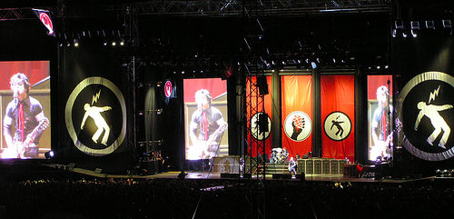 da flickr